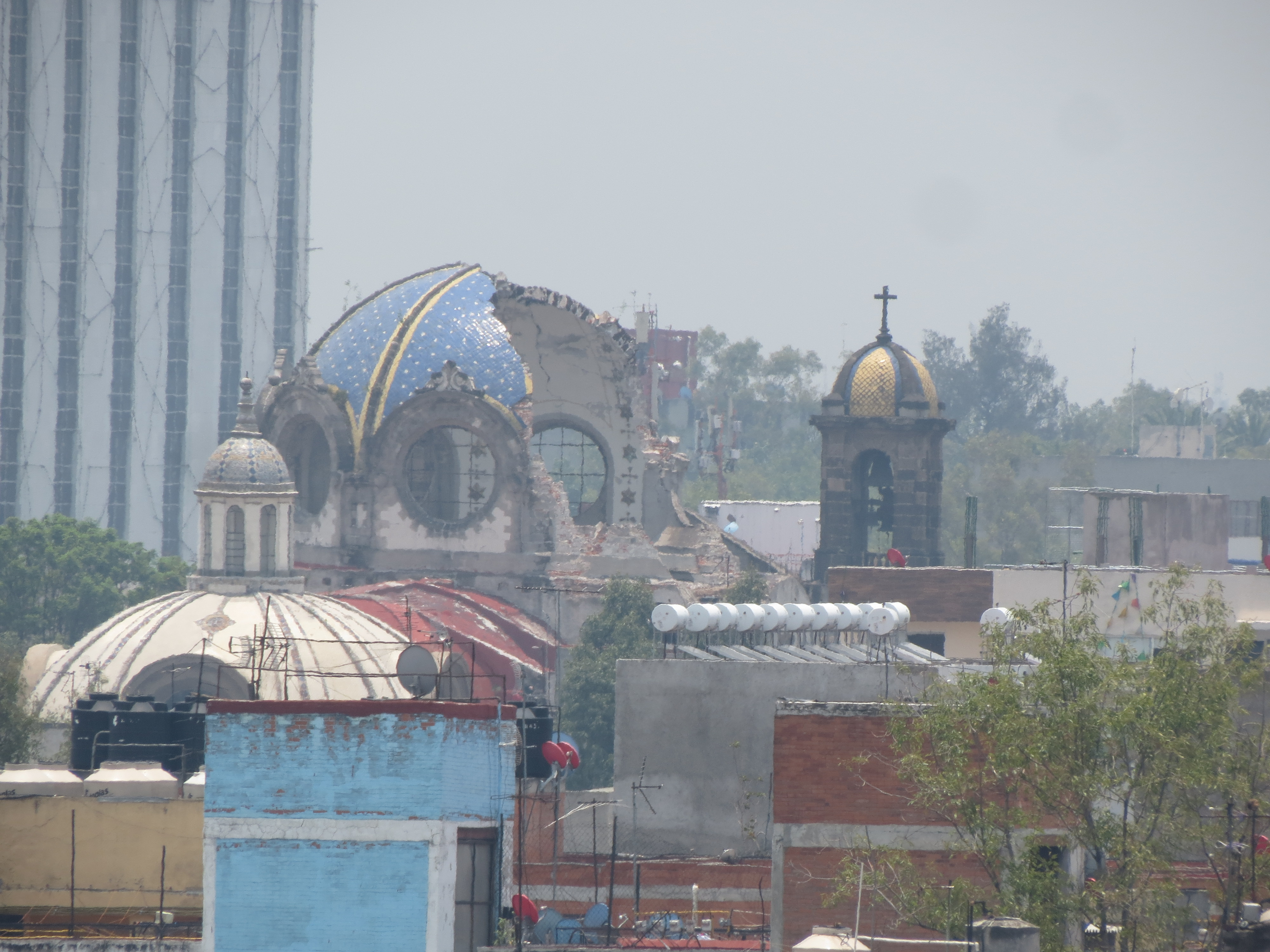 Panorámica de la Ciudad de México desde un balcón de la Biblioteca Vasconcelos